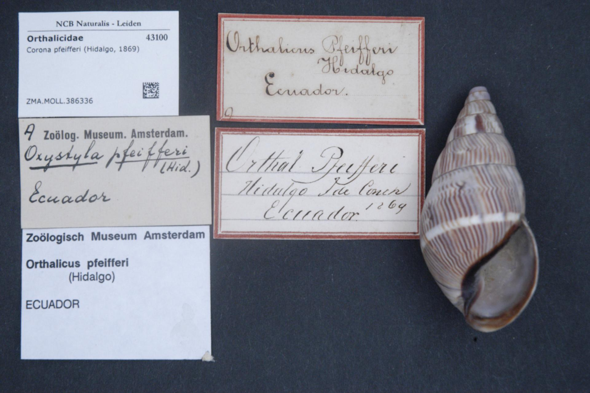 Corona pfeifferi (Hidalgo, 1869)